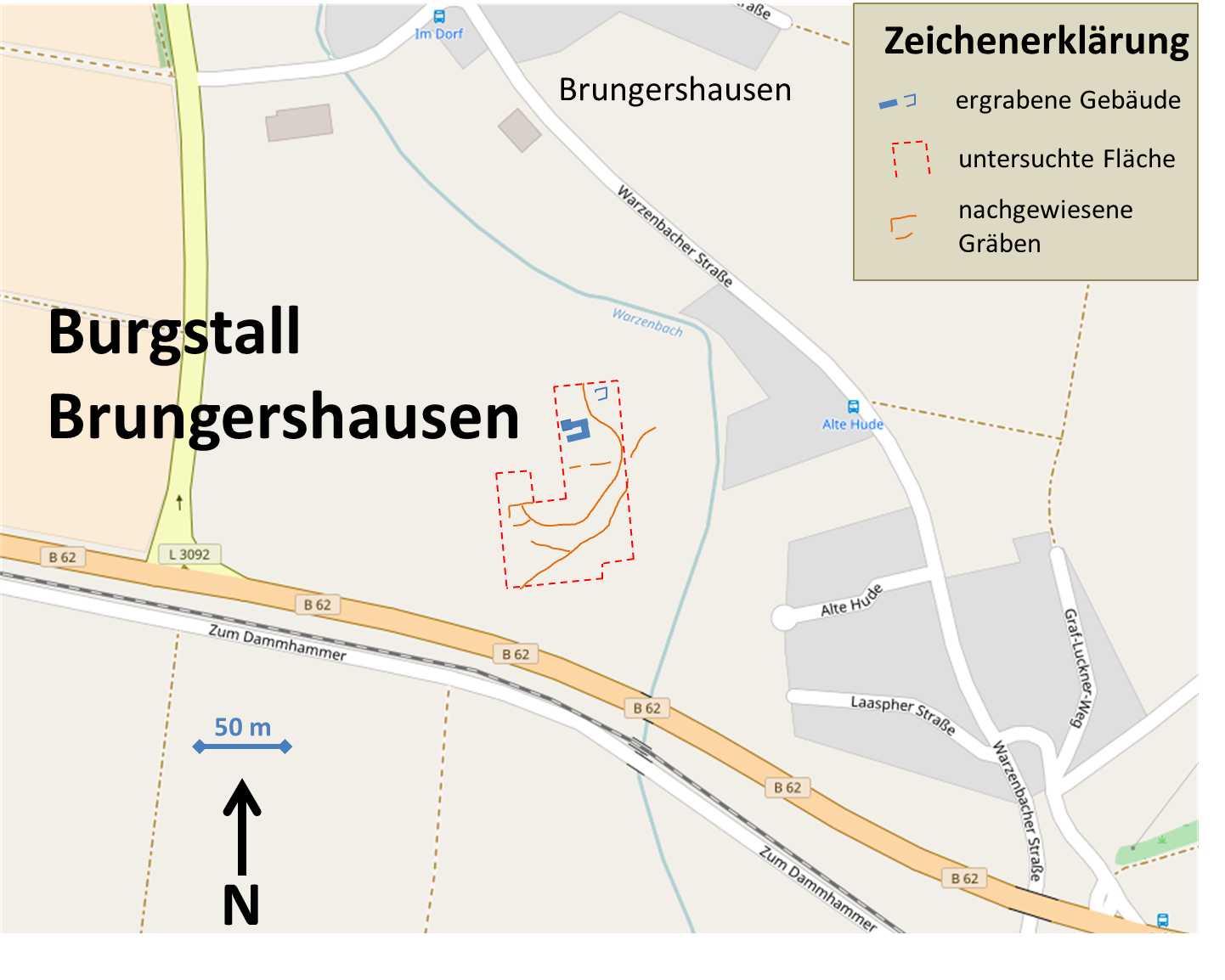 Lage und Ausgrabungsergebnisse des Burgstalls Brungershausen; Kartenmaterial: Open Street Map; Zeichnung selbst erstellt nach den Untersuchungsergebnissen in Bernhard Schroth: Interdisziplinäre Burgenforschung in Marburg, In: Deutsche Gesellschaft für Ur- und Frühgeschichte [DGUF] (Hrsg.): Archäologische Informationen. 19 1/2. Dr. Rudolph Habelt Verlag, Bonn 1996, S. 205–206